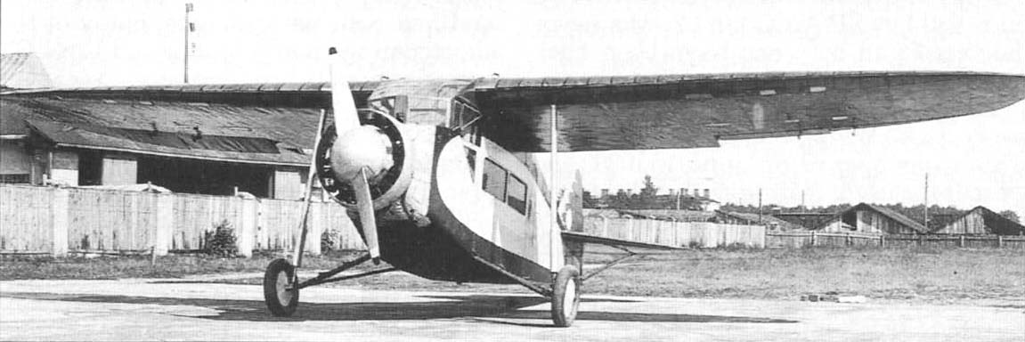 Polski samolot pasażerski PWS-21 bis SP-AEC.